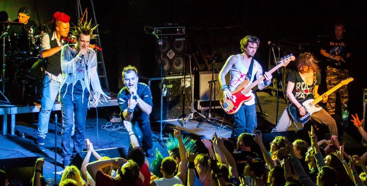 Концерт.